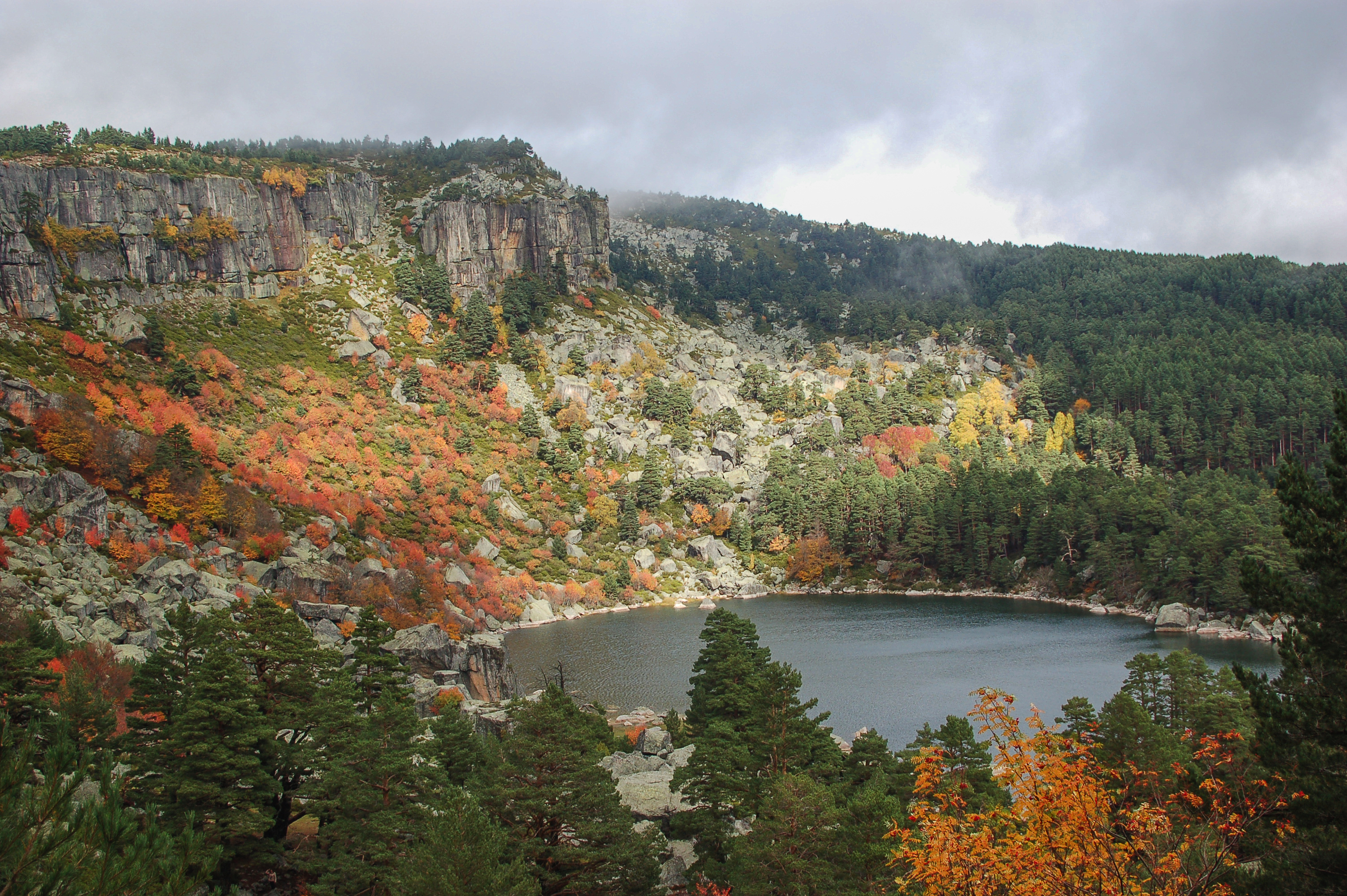 Vista de la Laguna Negra en la Sierra de Urbión, Soria